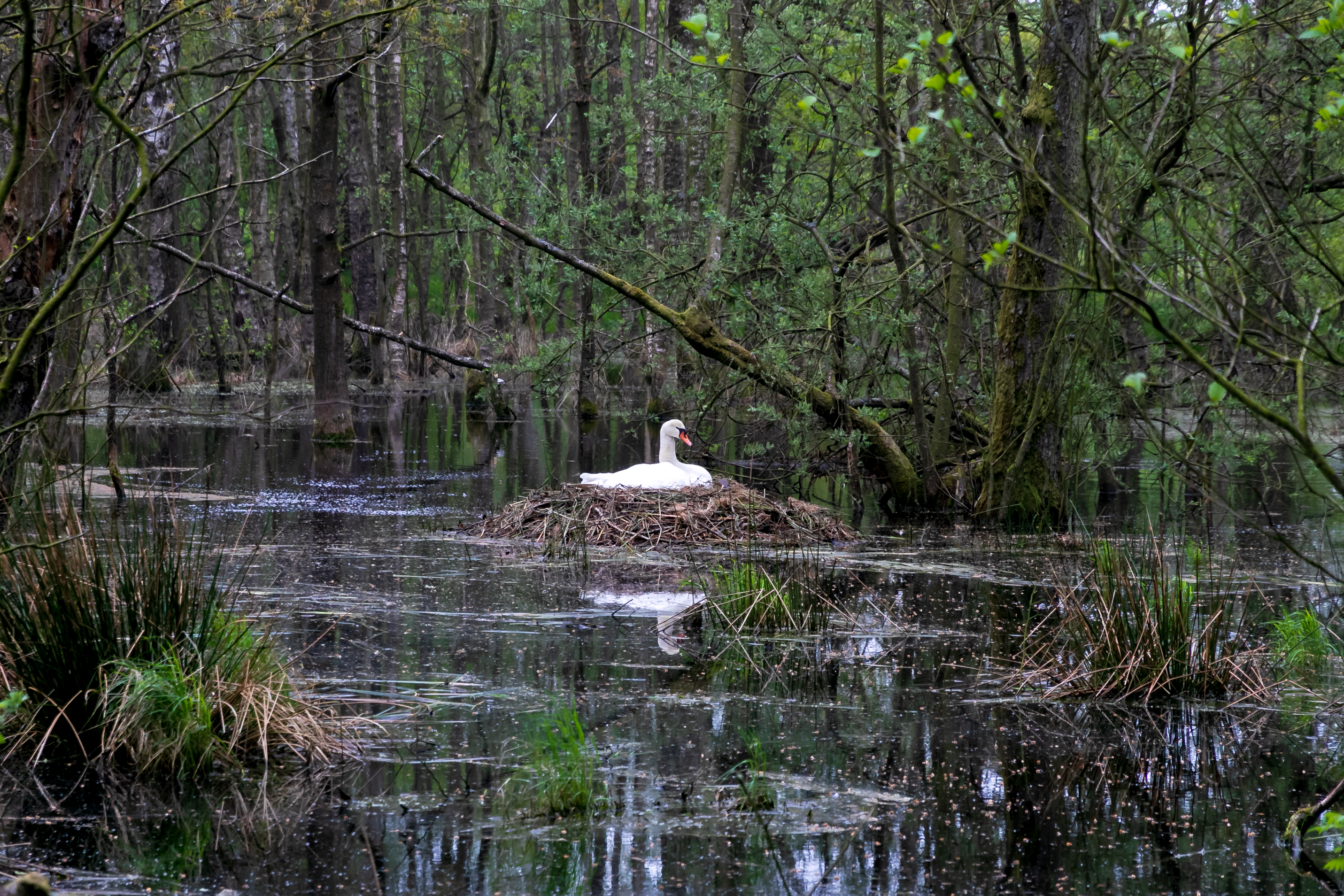 Brütender Schwan. Naturwald Stodthagen und angrenzende Hochmoore am Kaltenhofer Moor